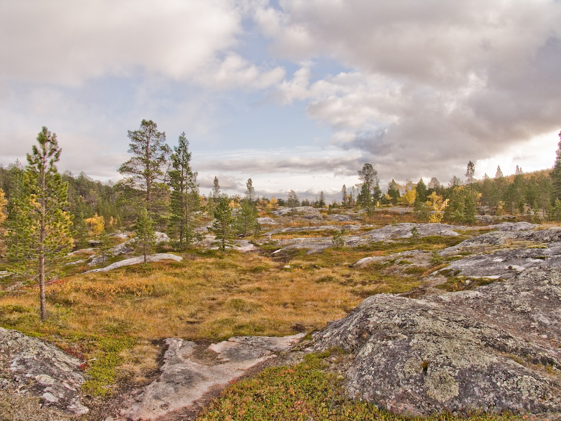 Övre Dividal